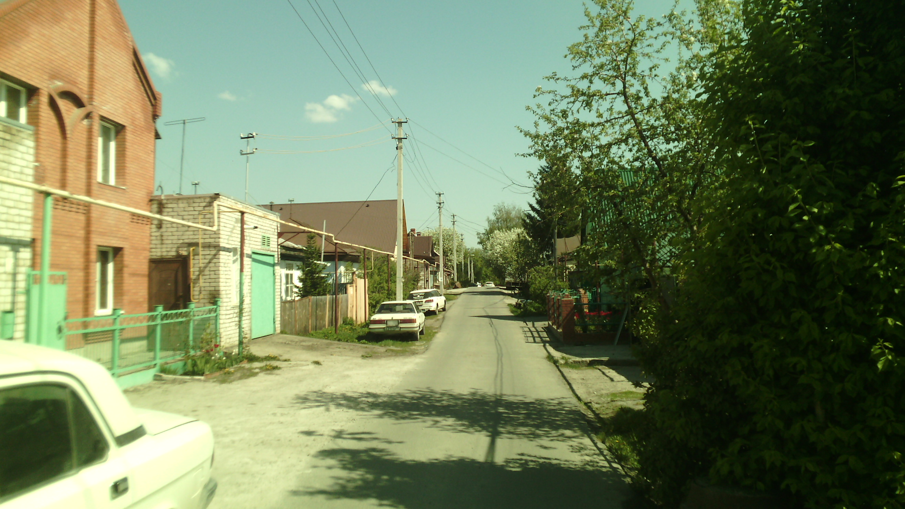 улица Катунская - типичная для застройки частного сектора в Железнодорожном районе Барнаула